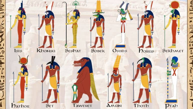 ეგვიპტელი ღმერთები